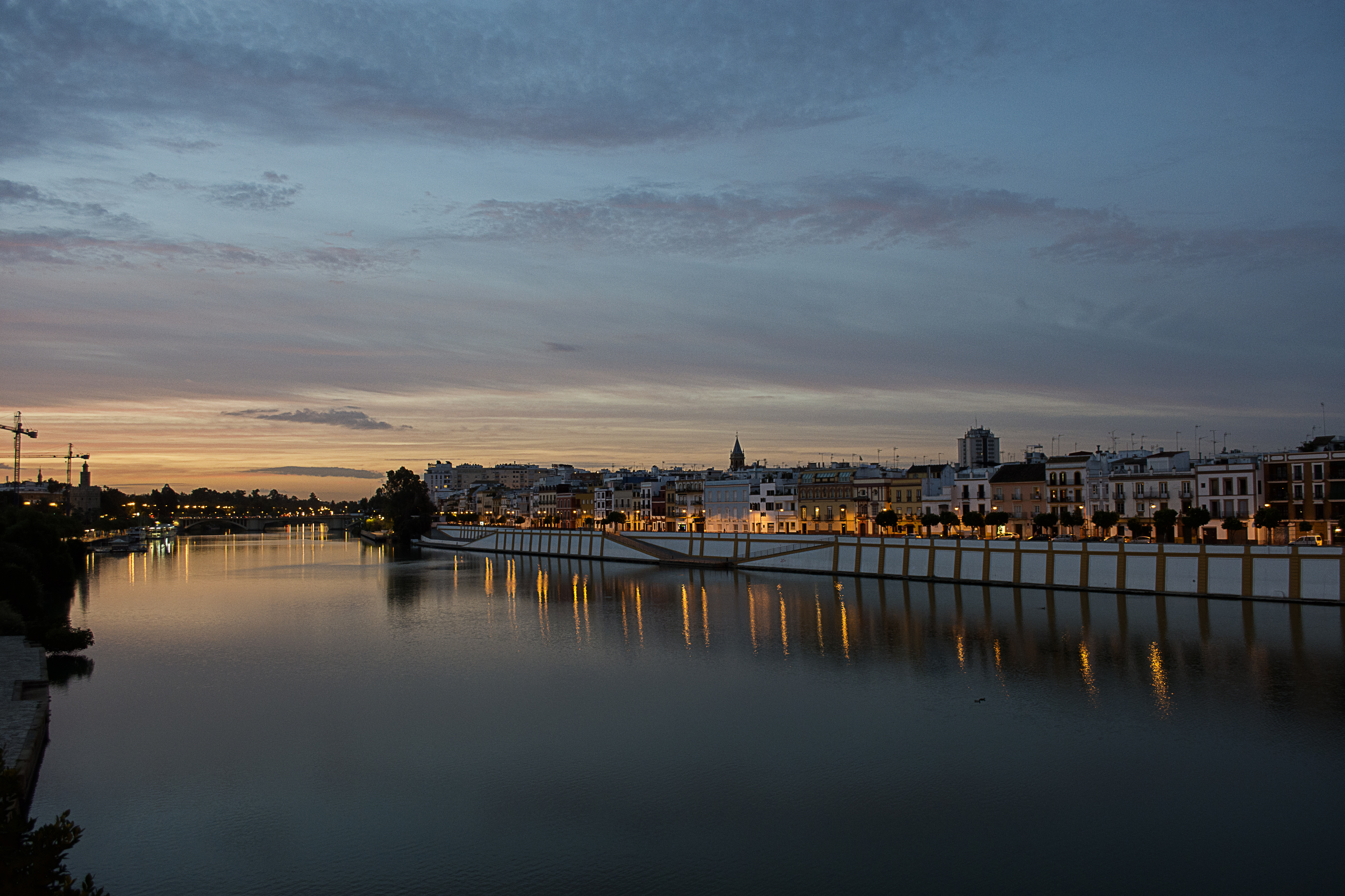 Vista de la calle Betis en Sevilla.